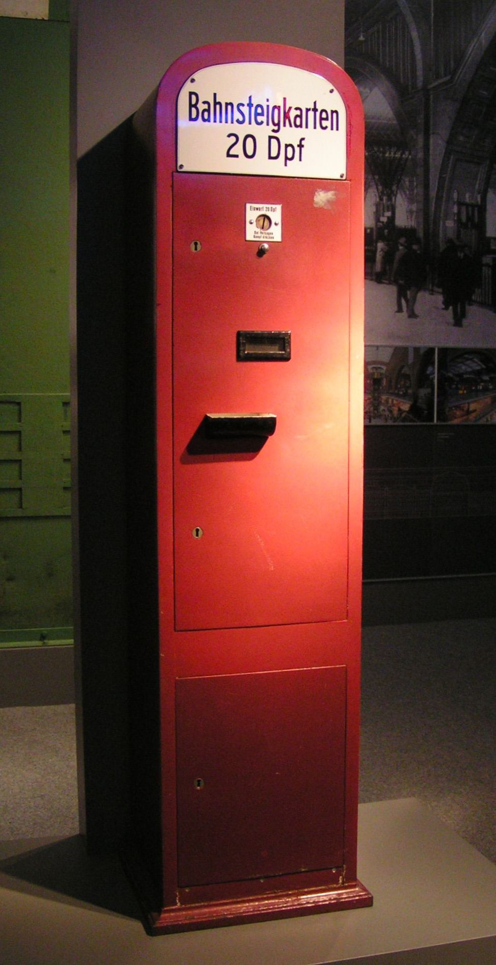 Bahnsteigkarten-Automat im DB-Museum, Nürnberg